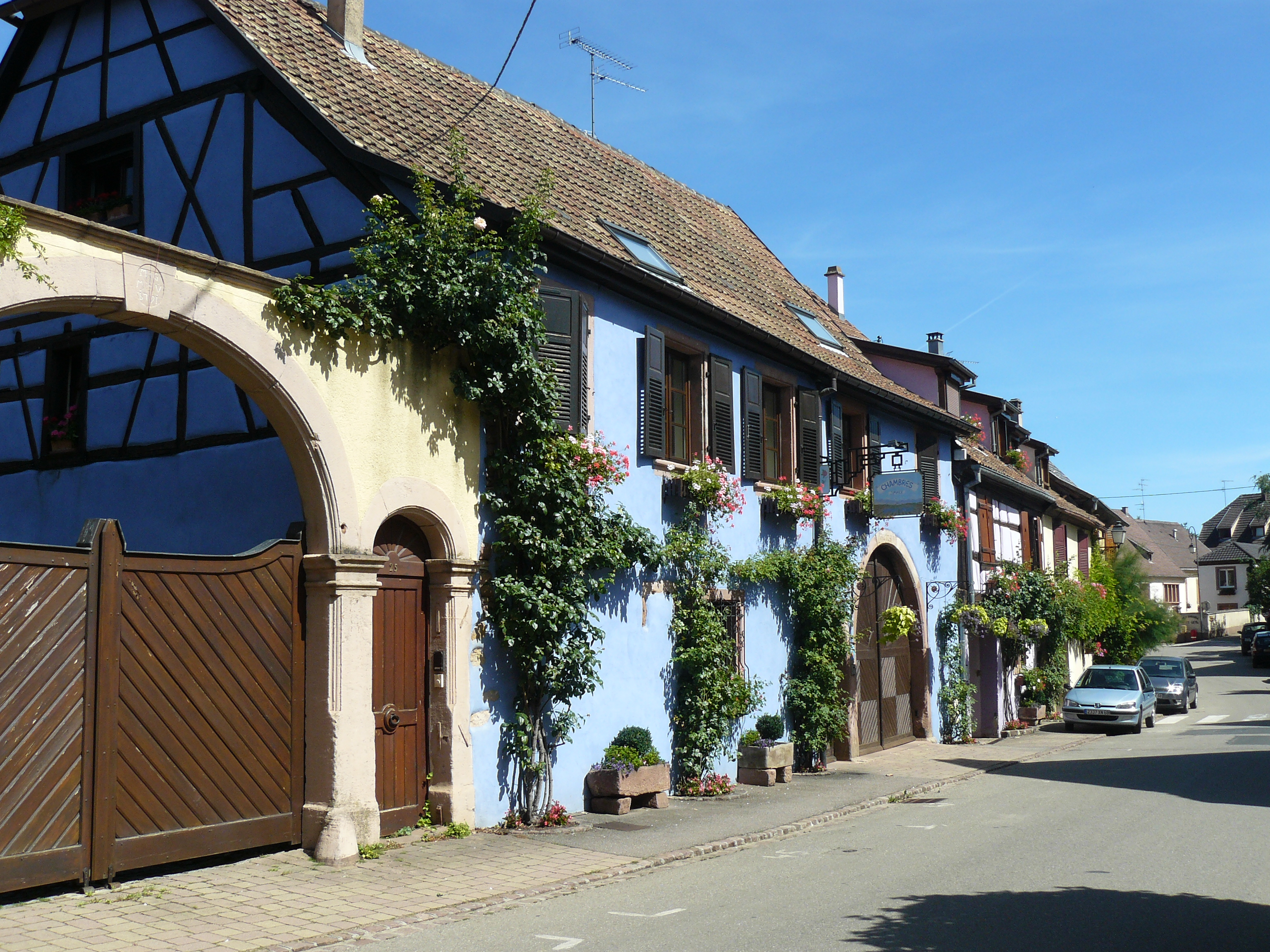 Anciennes maisons vigneronnes magnifiquement fleuries